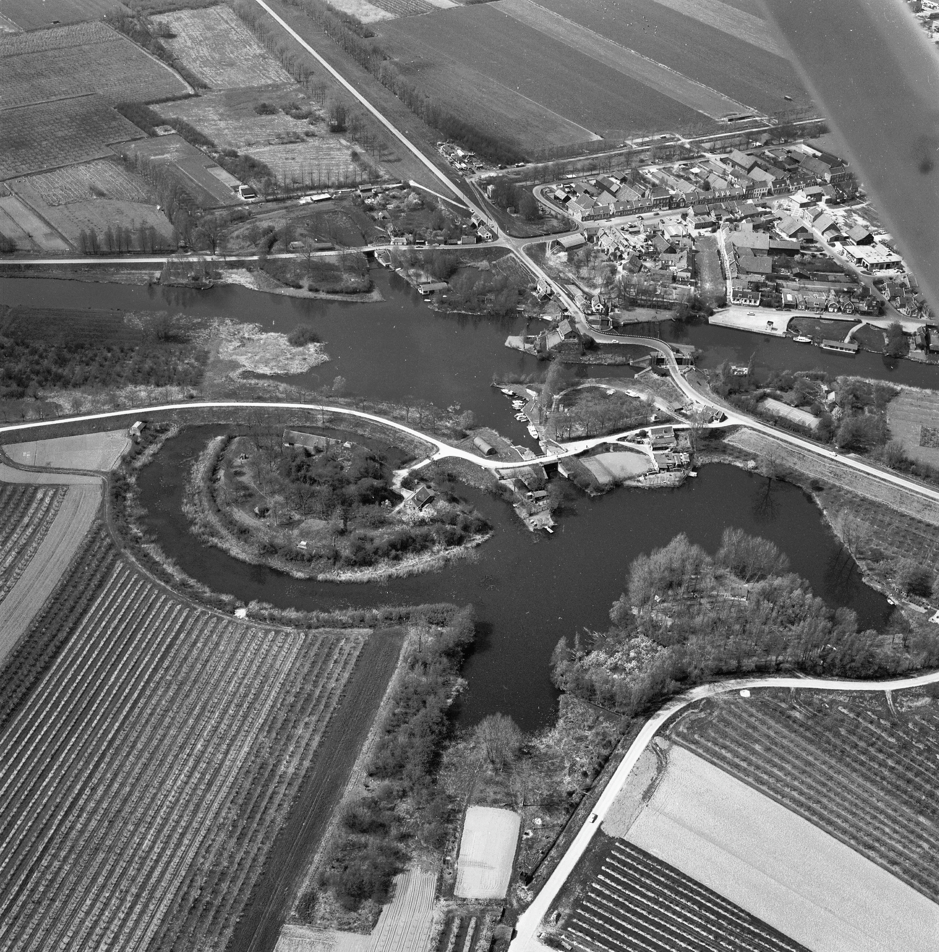 Overzicht en plattegronden: luchtfoto